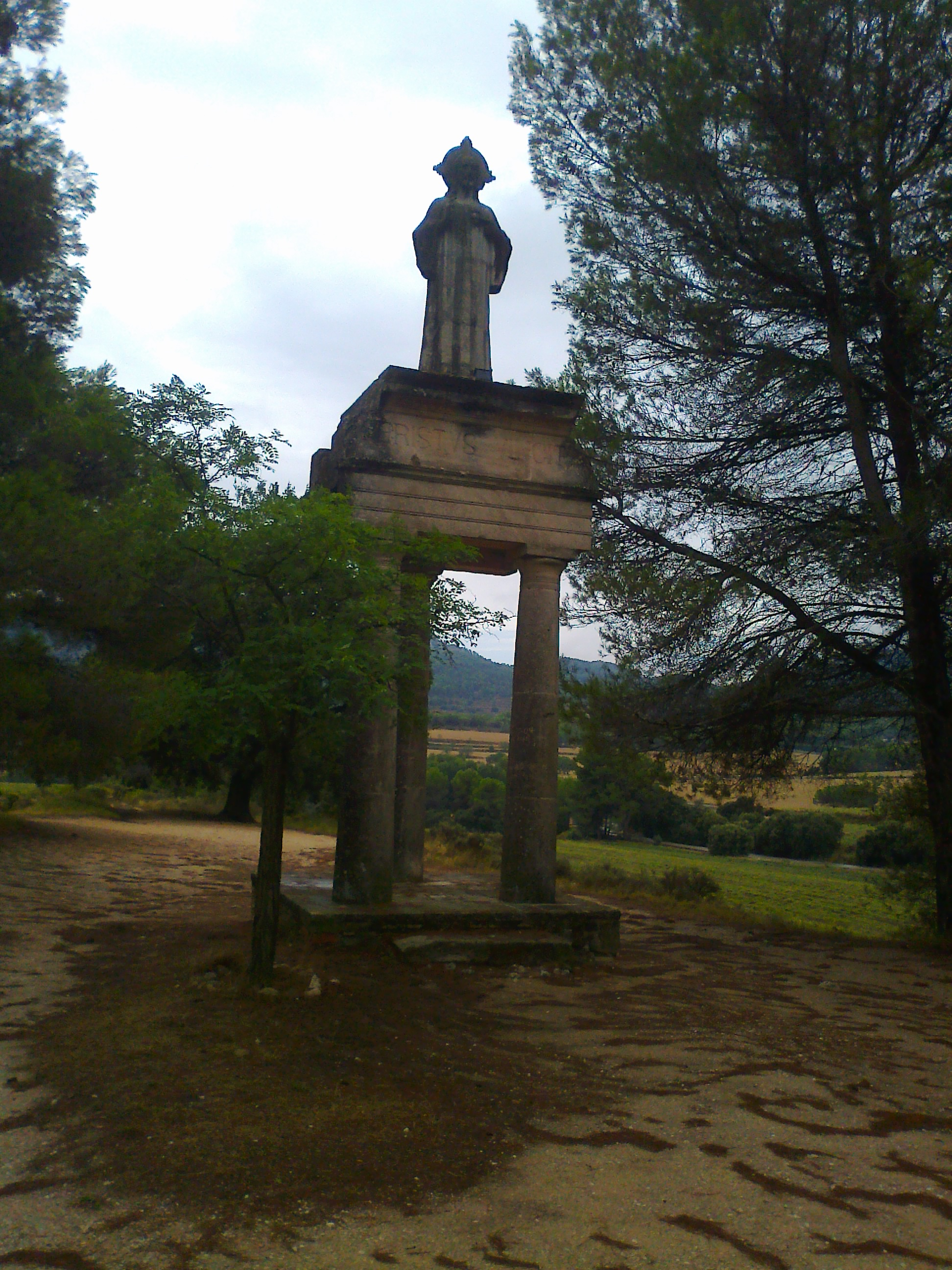 Estatua en l'Ermita de Polop, Alcoy (Alacant), 1917. Obra de l'artiste alcoyà Fernando Cabrera Cantó.